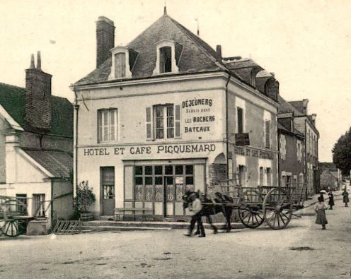 Place et hôtel à Courçay.